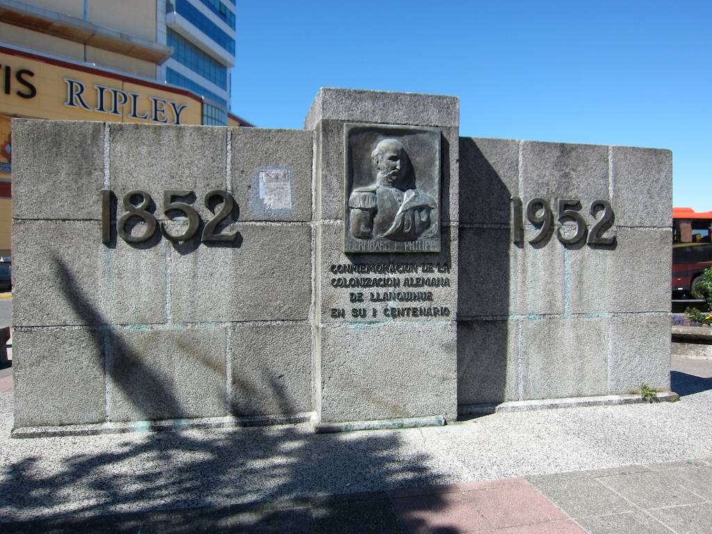 Relieve de Bernardo Philippi en Puerto Montt, Chile.